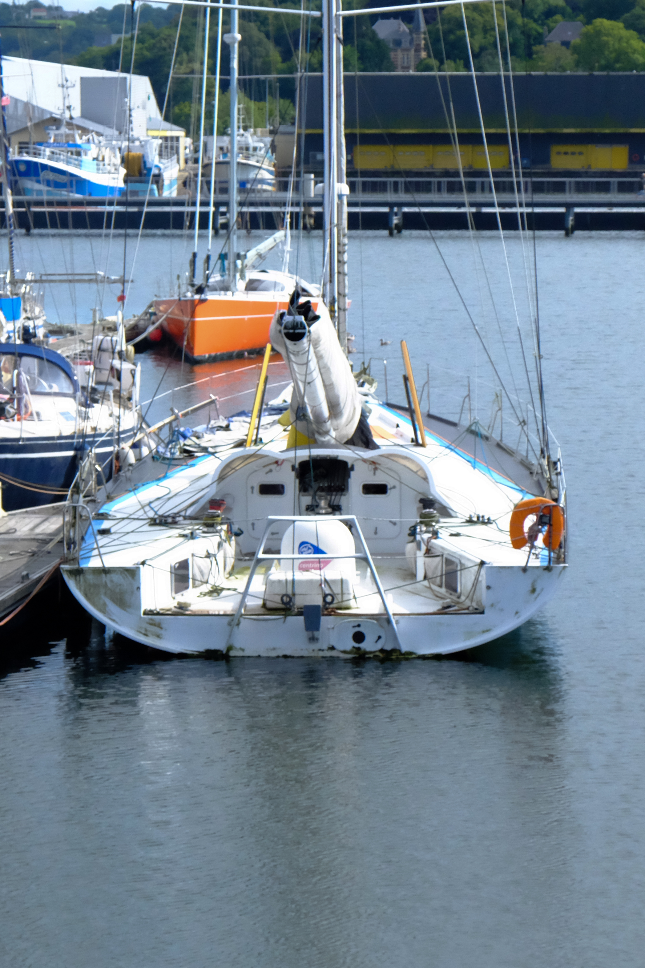 L'ancien 60 pieds IMOCA Geodis de Christophe Auguin en 2017 dans le port de Cherbourg.